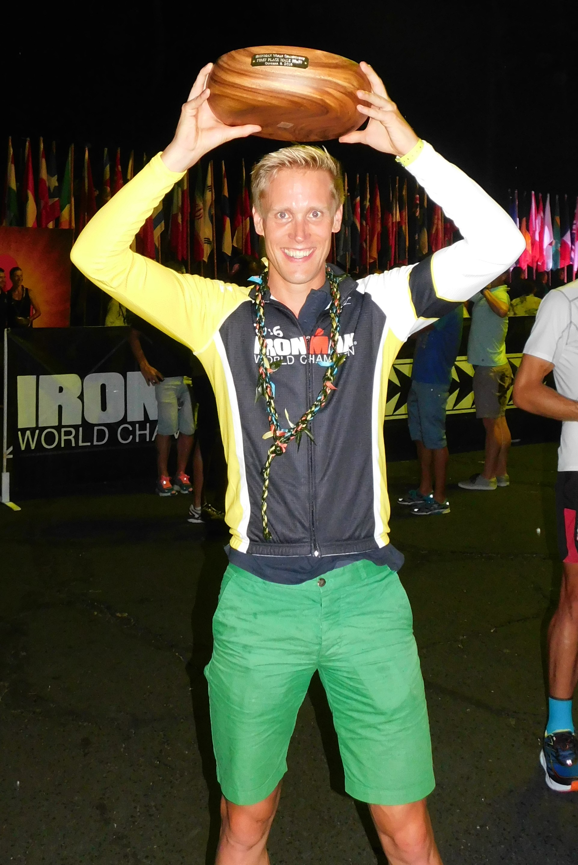 Siegerfoto